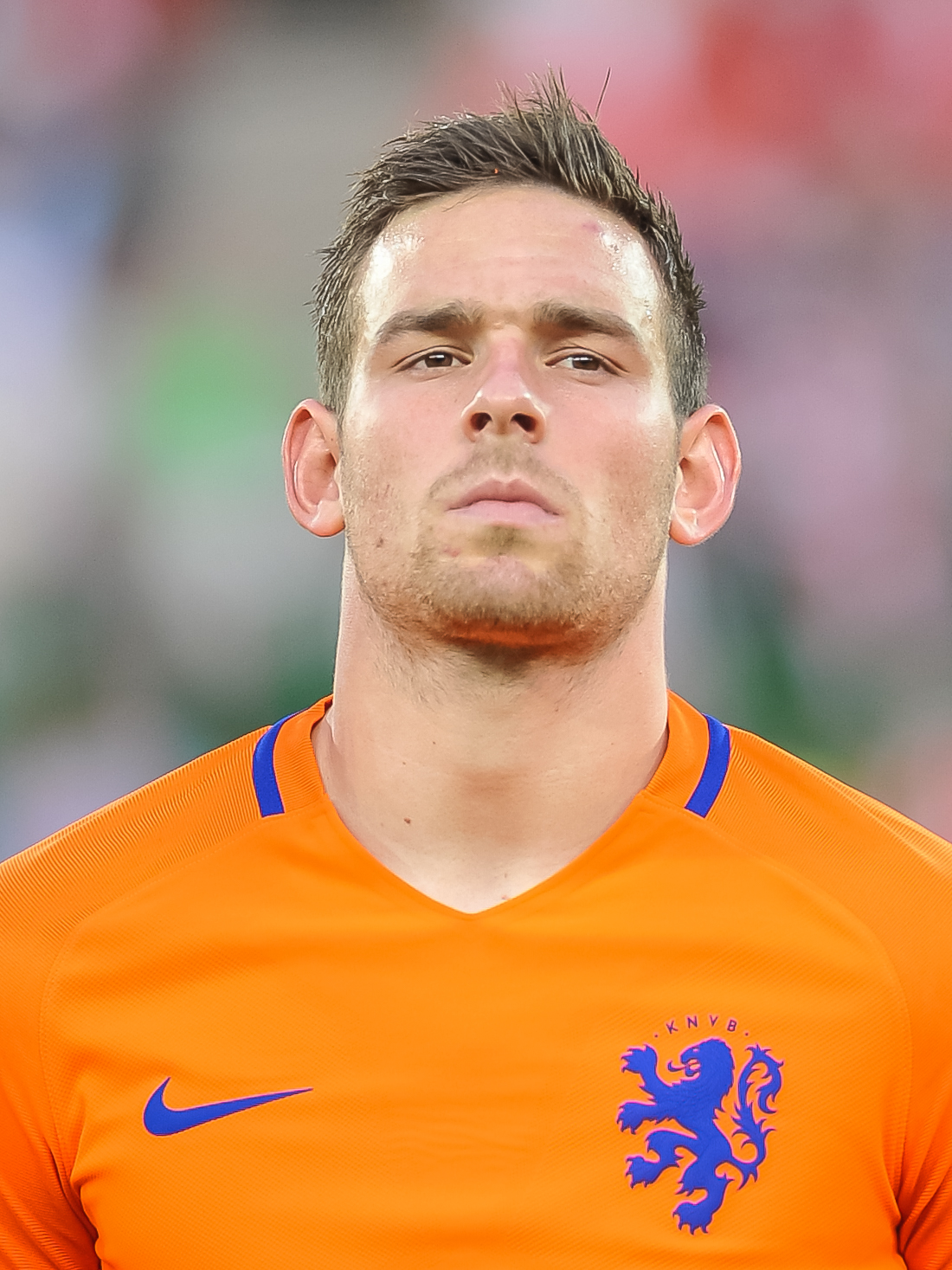 Wien, 4.6.2016, ÖFB Laenderspiel - Österreich vs Niederlande. Bild zeigt Vincent Janssen (NED).